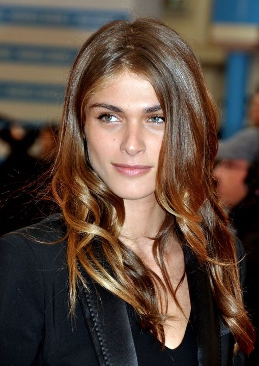 Elisa Sednaoui au festival de Deauville